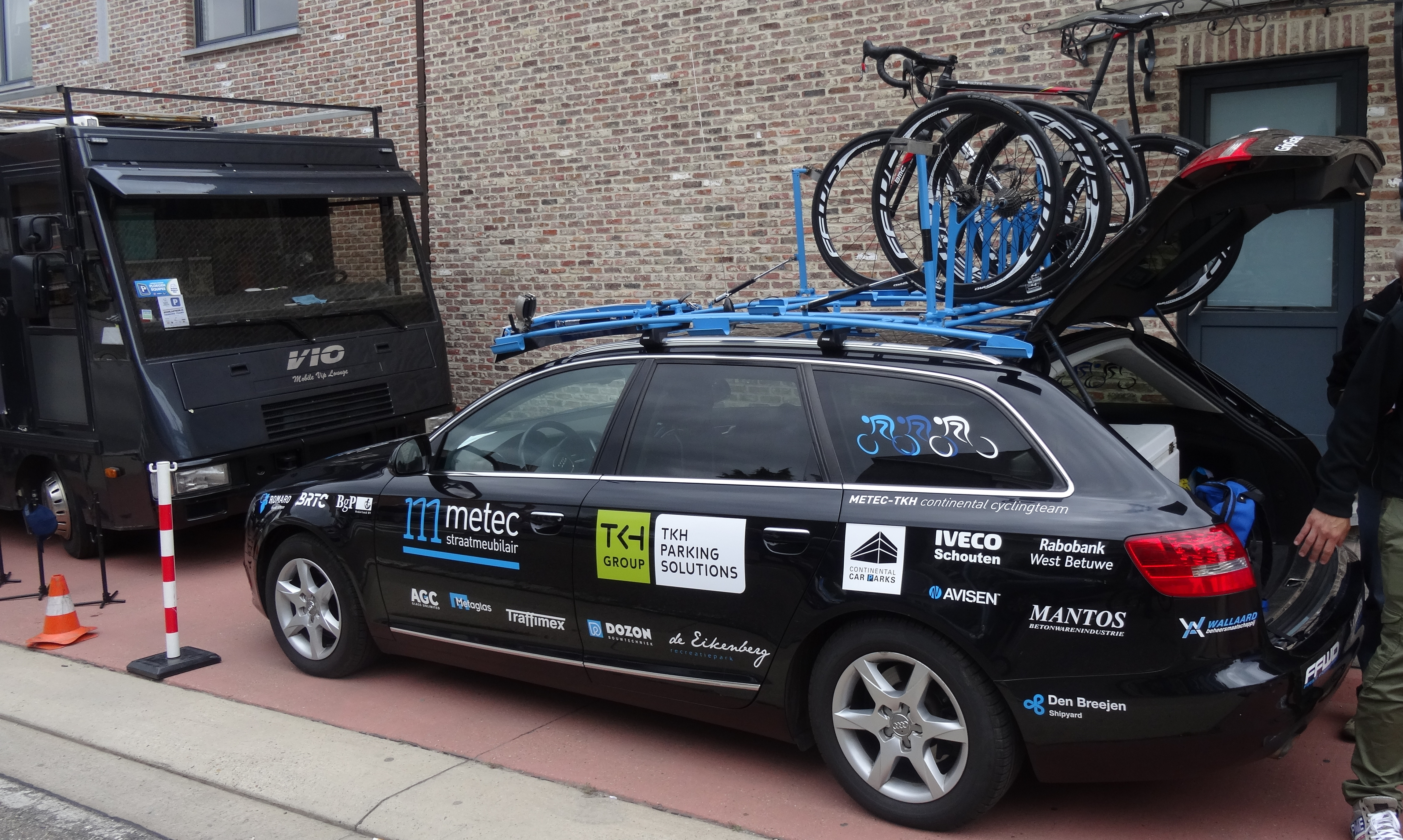 Reportage photographique réalisé le dimanche 15 juin à l'occasion du départ et de l'arrivée du Tour du Limbourg 2014 à Tongres, Belgique.